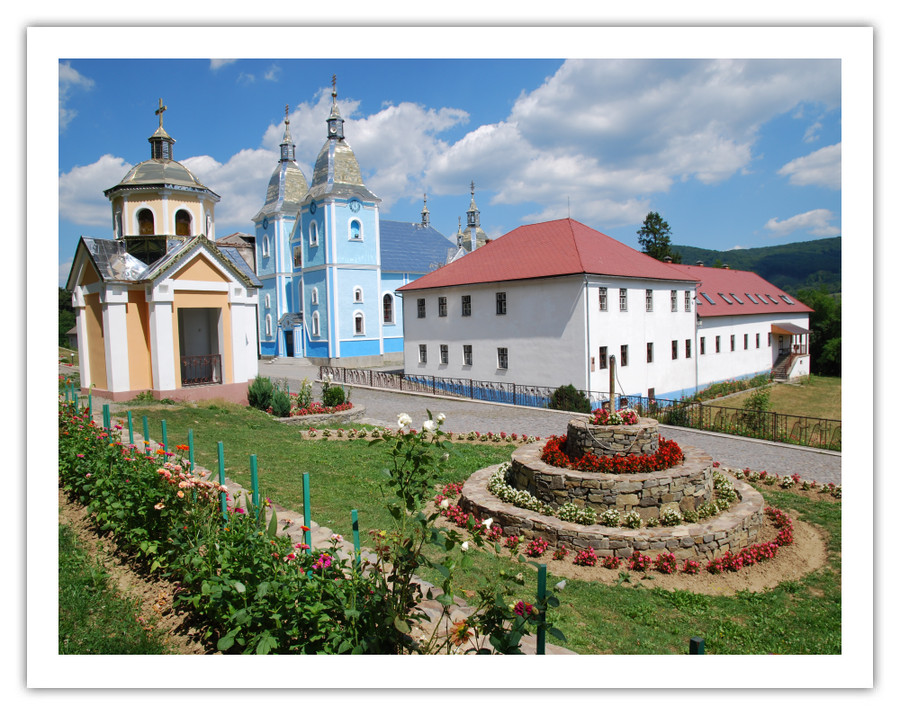 МАЛОБЕРЕЗНЯНСЬКИЙ МОНАСТИР СВЯТОГО МИКОЛАЯ (сучасний вид )